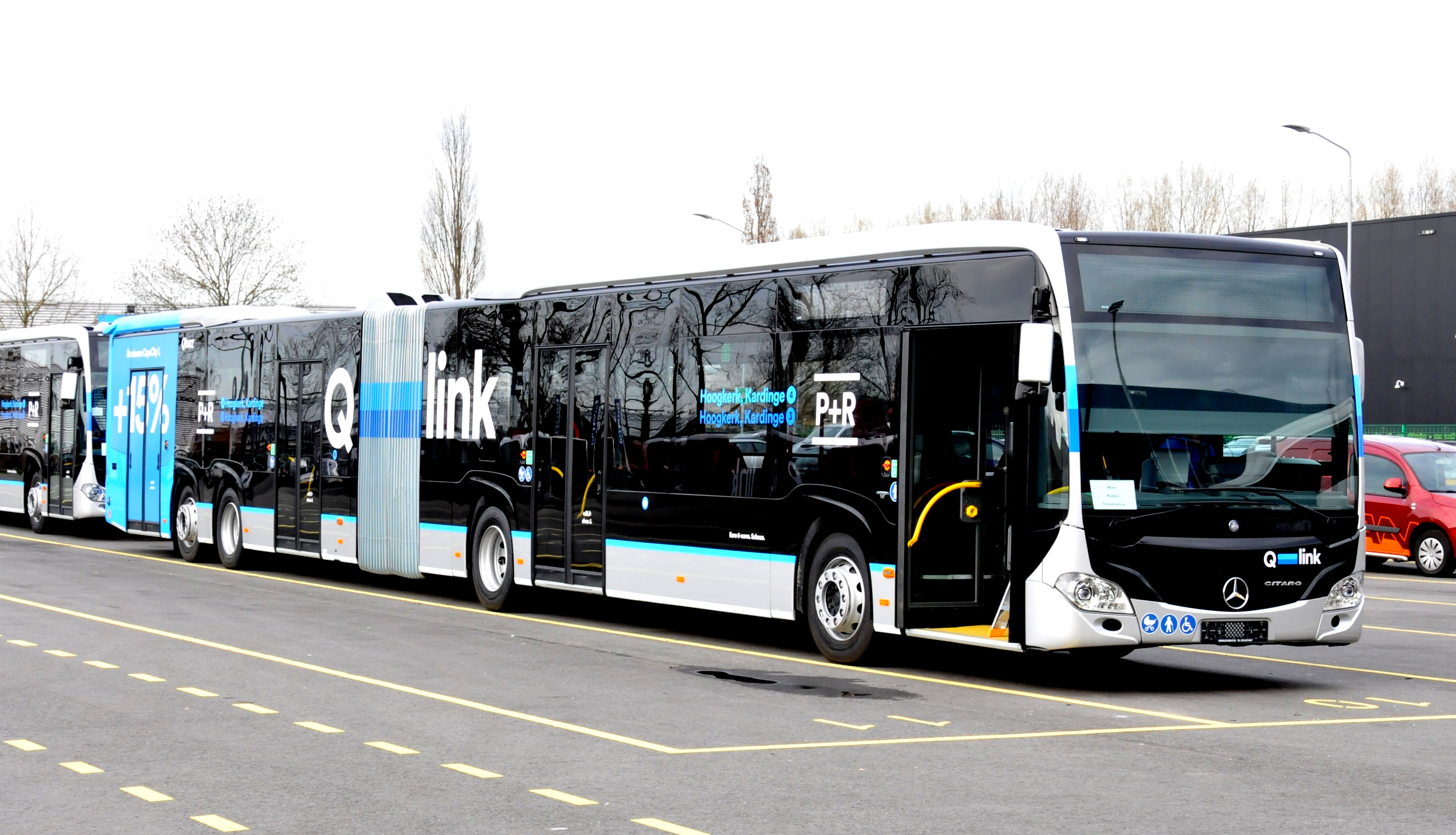 Qbuzz bus 34.. van het type Mercedes-Benz CapaCity L te Groningen.